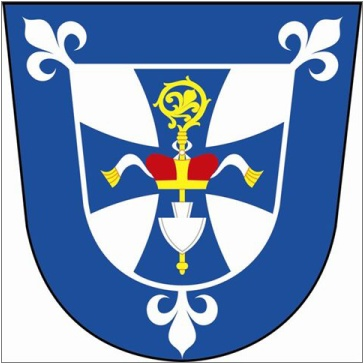 znak obce Kněžpole